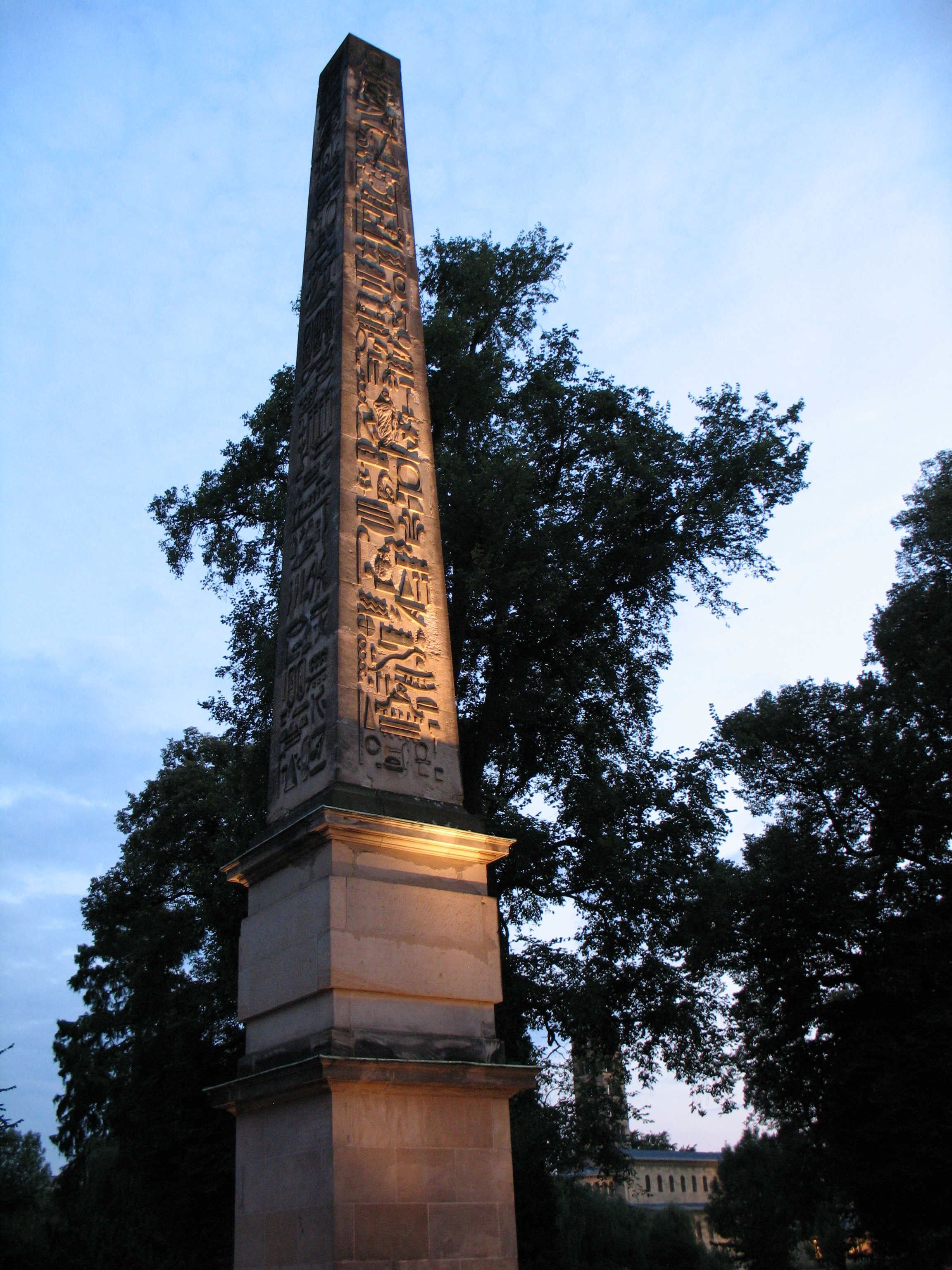 Obelisk am Eingang zum Park Sanssouci, Schopenhauerstraße, Potsdam